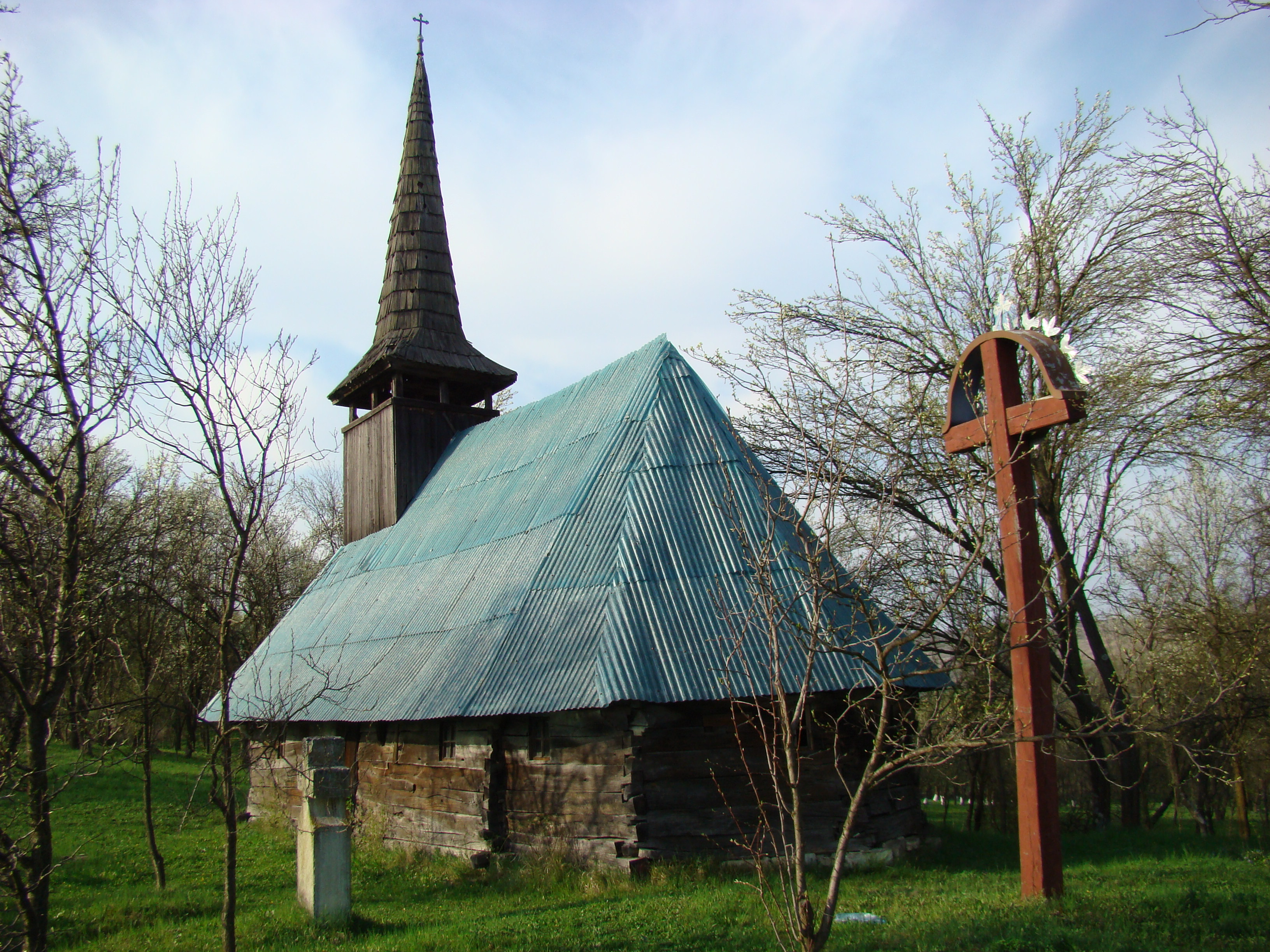 Biserica de lemn din Tioltiur, judeţul Cluj.